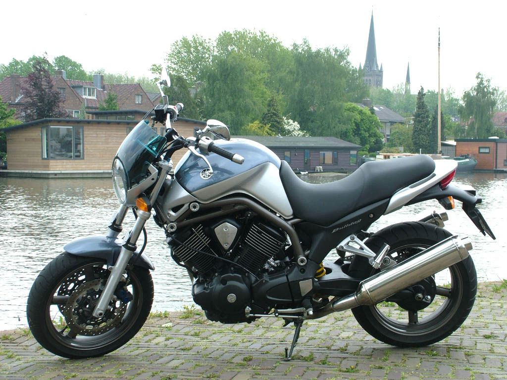 Yamaha BT 1100 origine